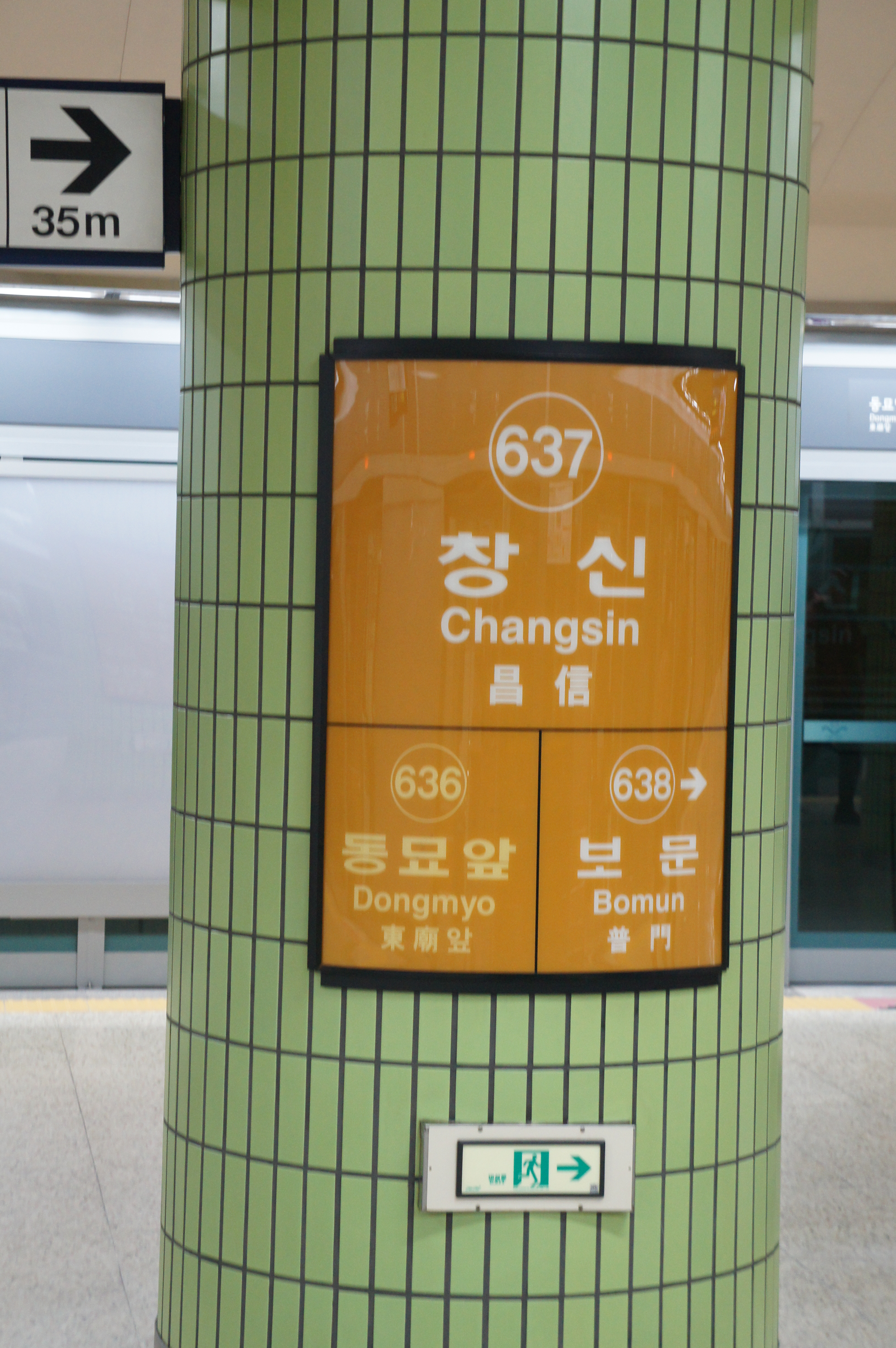 창신역 역명판